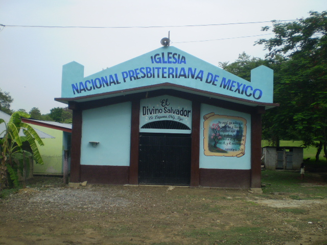 iglesia principal